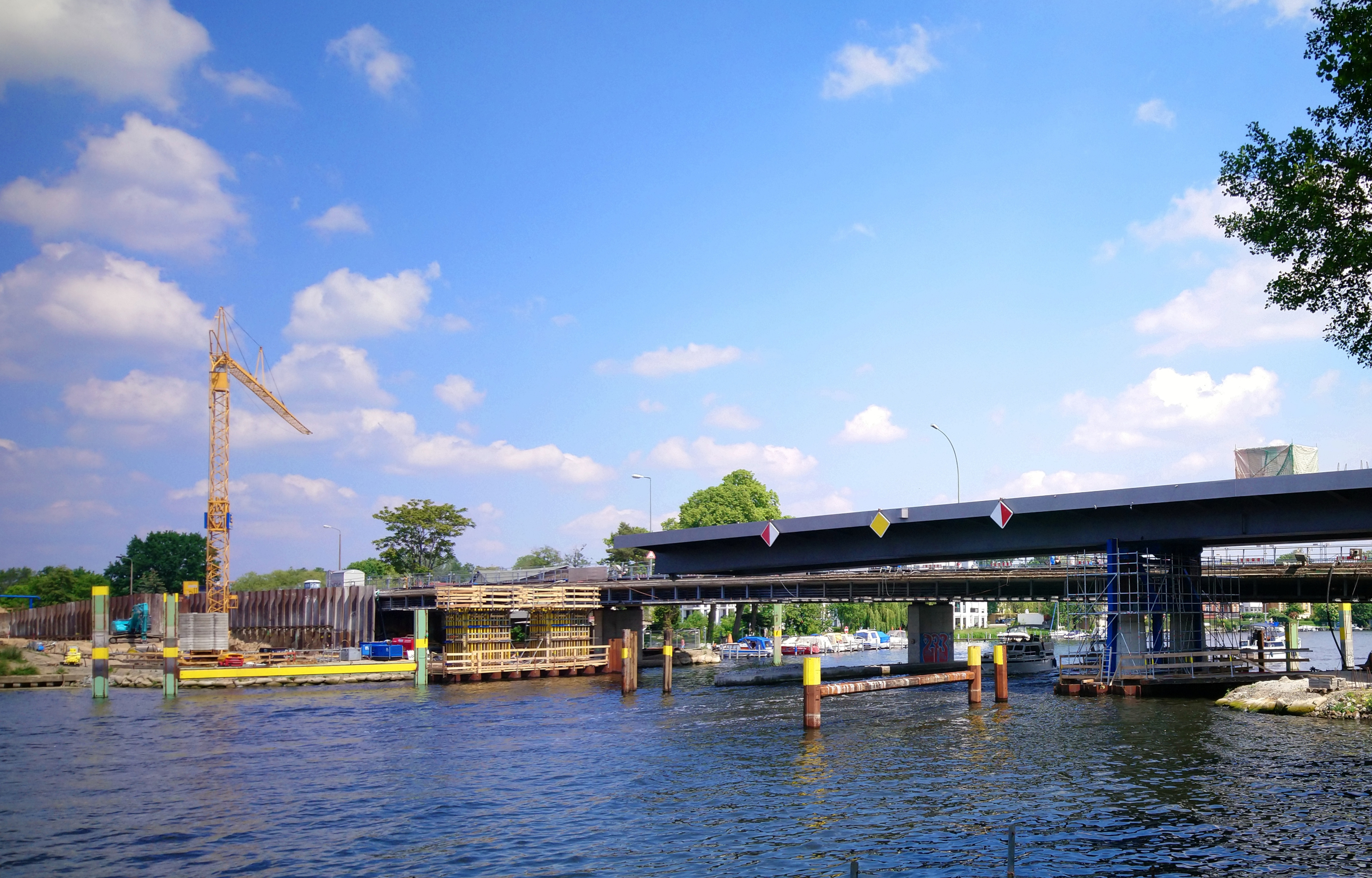 Die Salvador-Allende-Brücke im Juni 2019, Blick aus Südwest